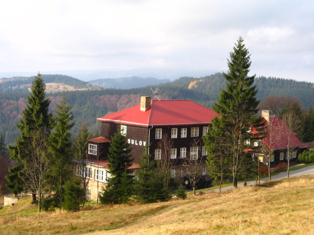 Bílý kříž, Sulov cottage in Beskydy